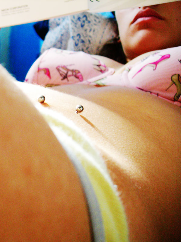 Lei